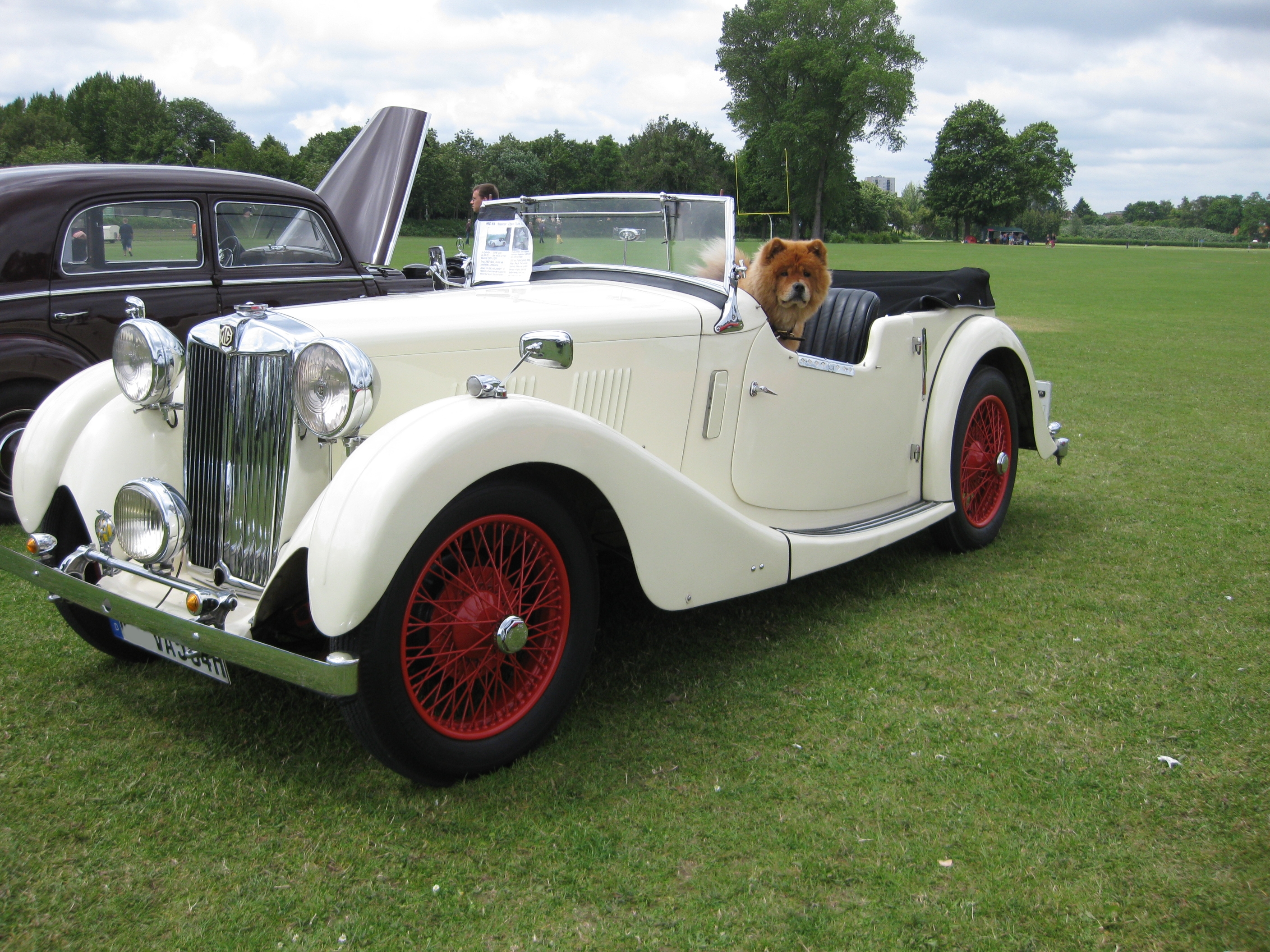 MG YA Roadster Frontansicht